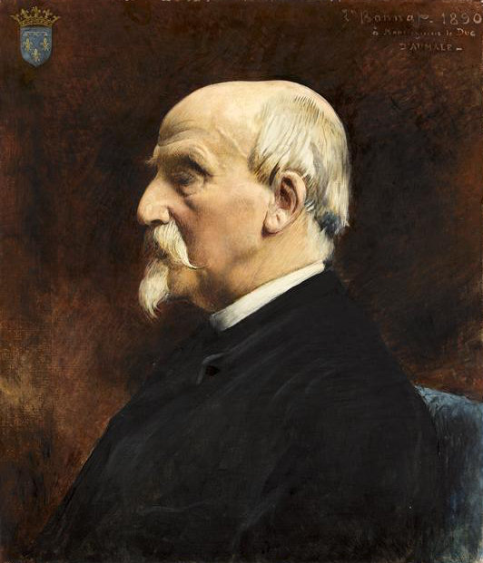 Porträt Henri-Eugène-Philippe-Emmanuels d’Orléans, Herzog von Aumale